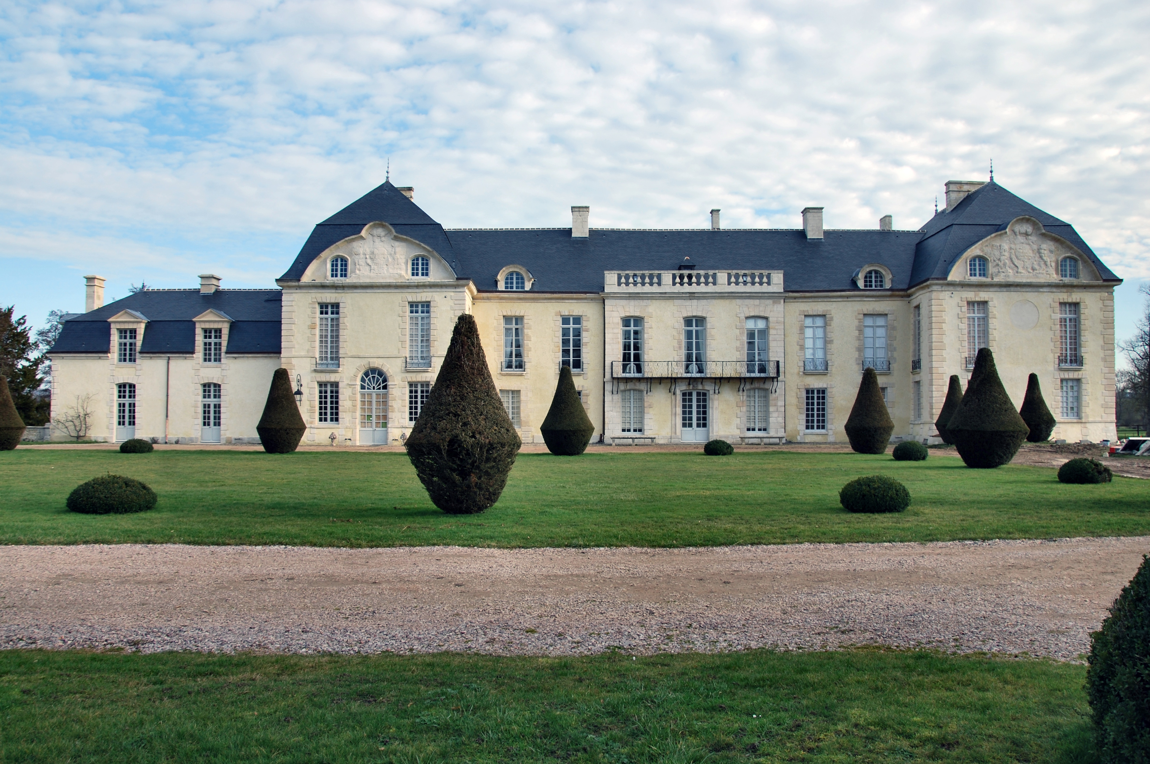 This building is en partie classé, en partie inscrit au titre des Monuments Historiques. .